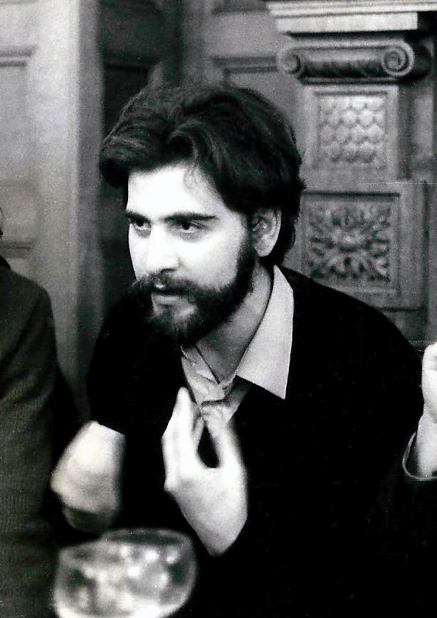 Álvaro en el palacio de miraflores. Ganador del Ciudad de San Sebastián. 1983.